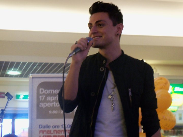 Virginio Simonelli in concerto a Pavia